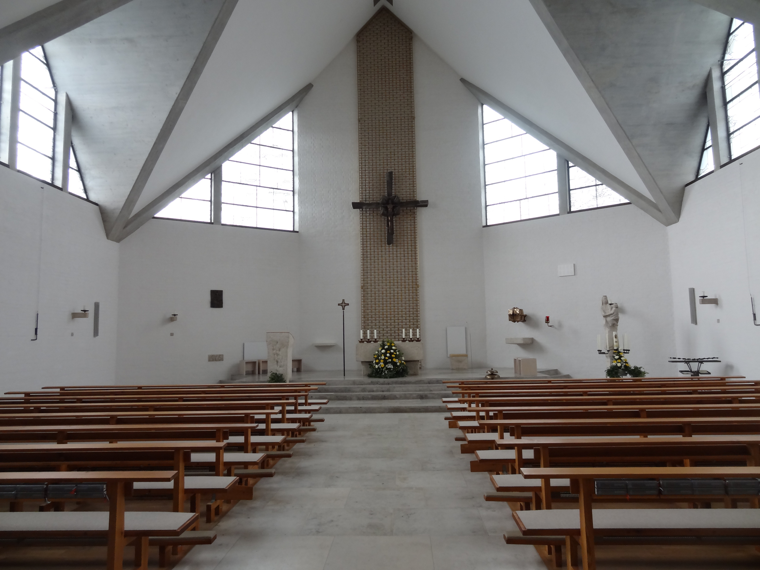 Innenraum der kath. Pfarrkirche St. Johannes der Täufer in Bodenkirchen (Lkr. Landshut, Bayern)